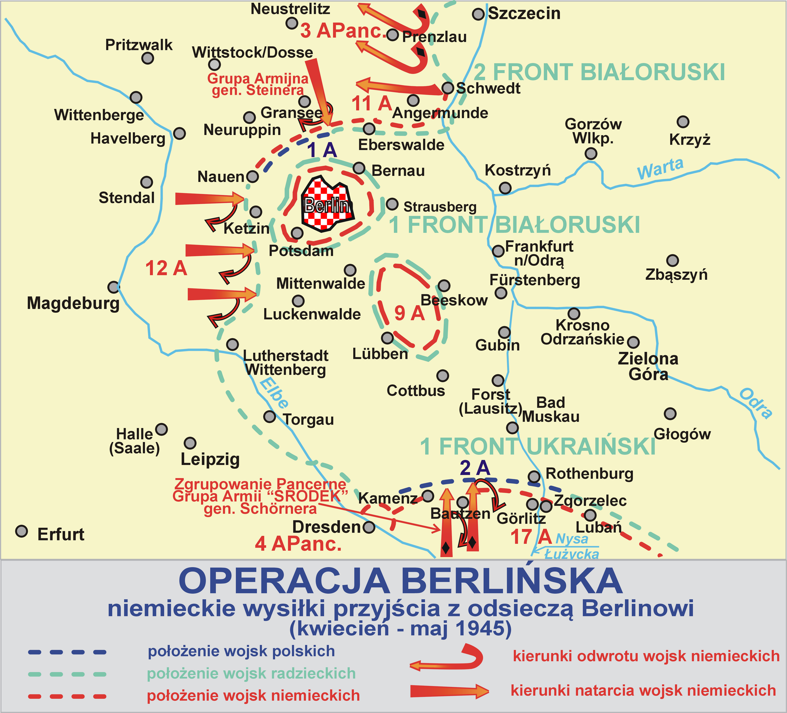 Operacja berlińska - niemieckie wysiłki przyjścia z odsieczą Berlinowi - kwiecień -maj 1945